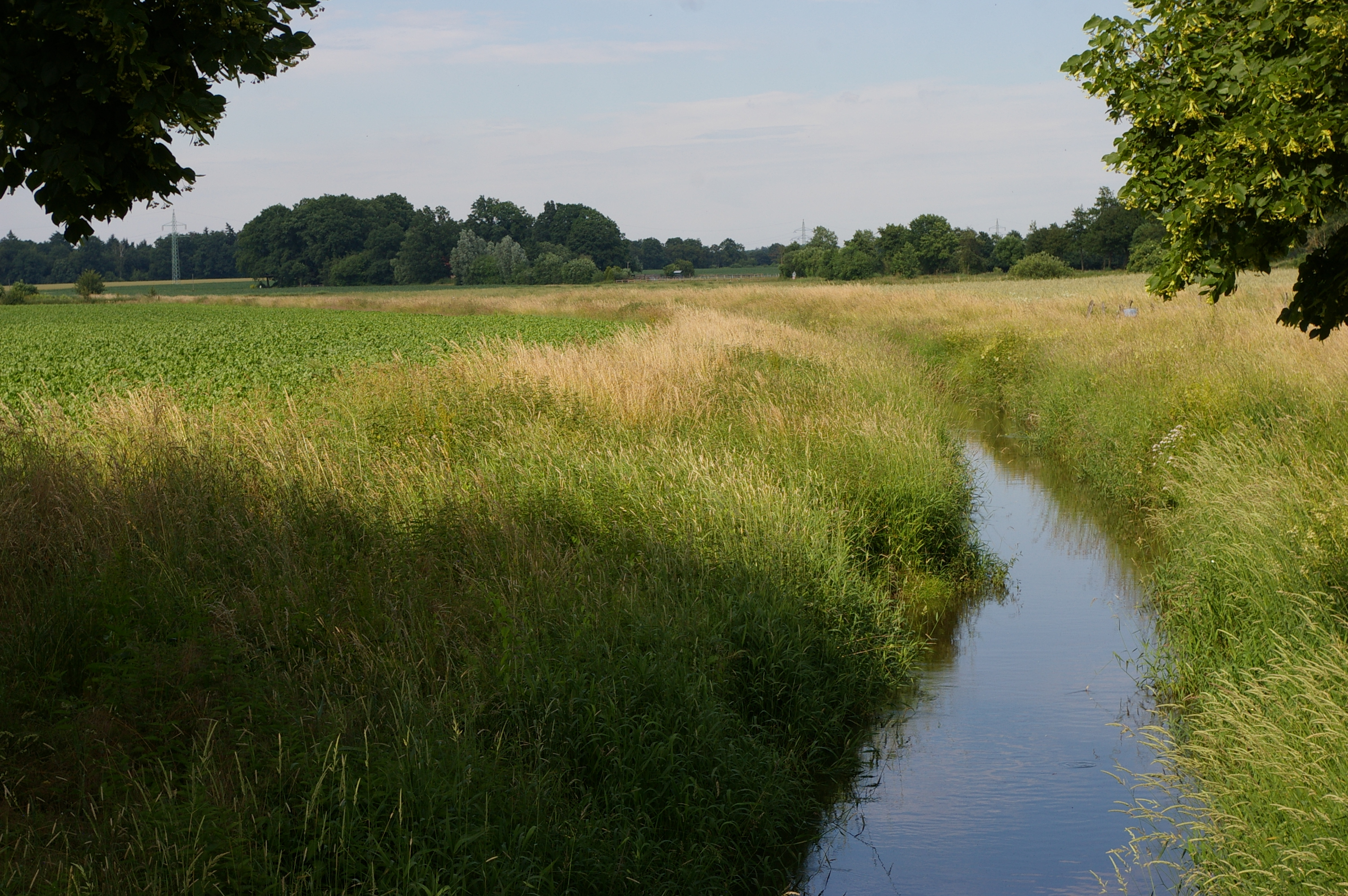 Die Siede in Siedenburg